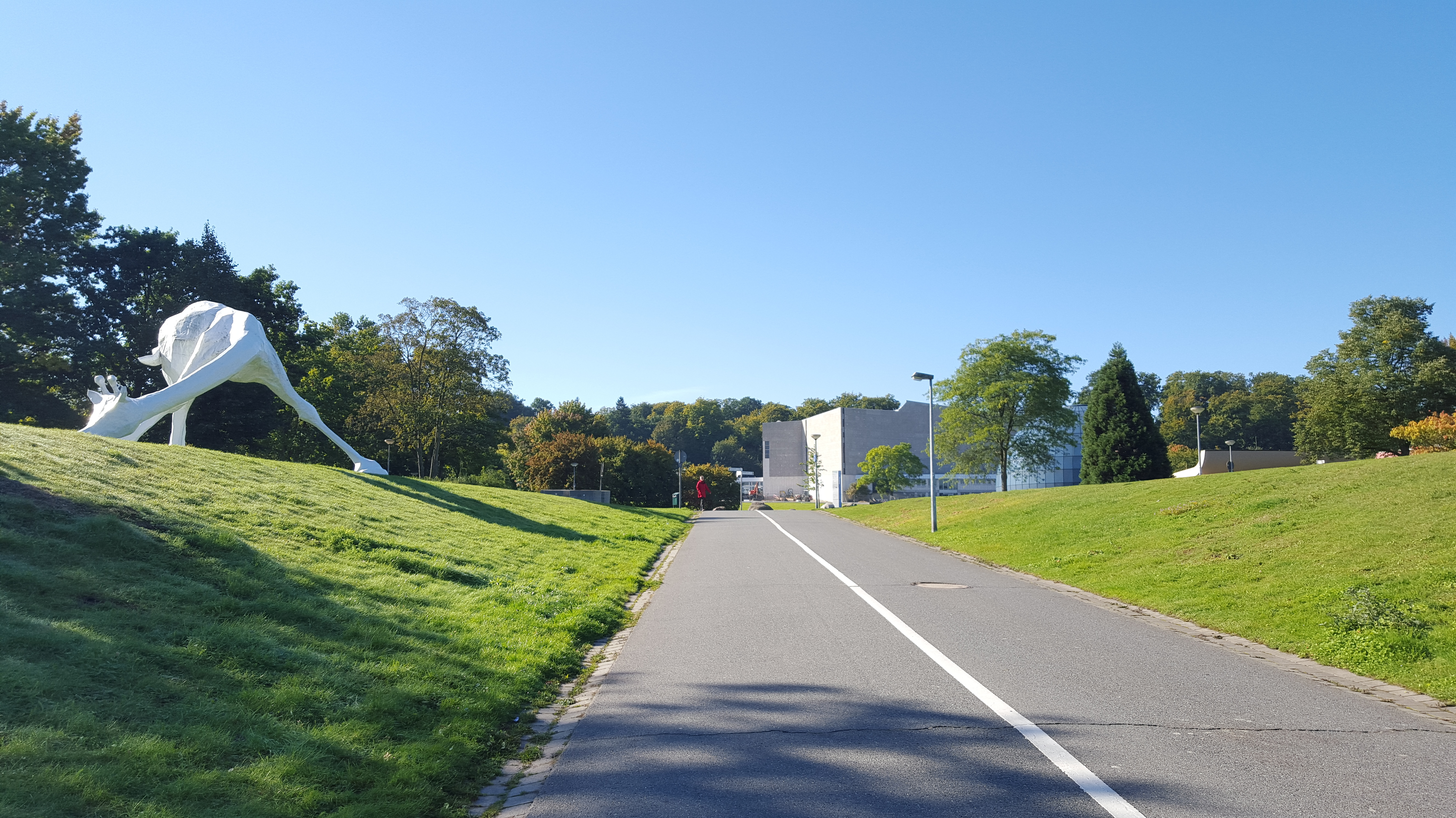 Das Bild zeigt den Blick auf das Südende der Porschestraße in Wolfsburg. Am linken Bildrand ist die Skulptur von Sina Heffner, "Weiße Giraffe" (2009), zu sehen. In der rechten Bildhälfte sieht man im Hintergrund das Planetarium (blaue Kuppel) und das Theater (weißes Gebäude). Der Blick ist gen Süd-Westen gerichtet.